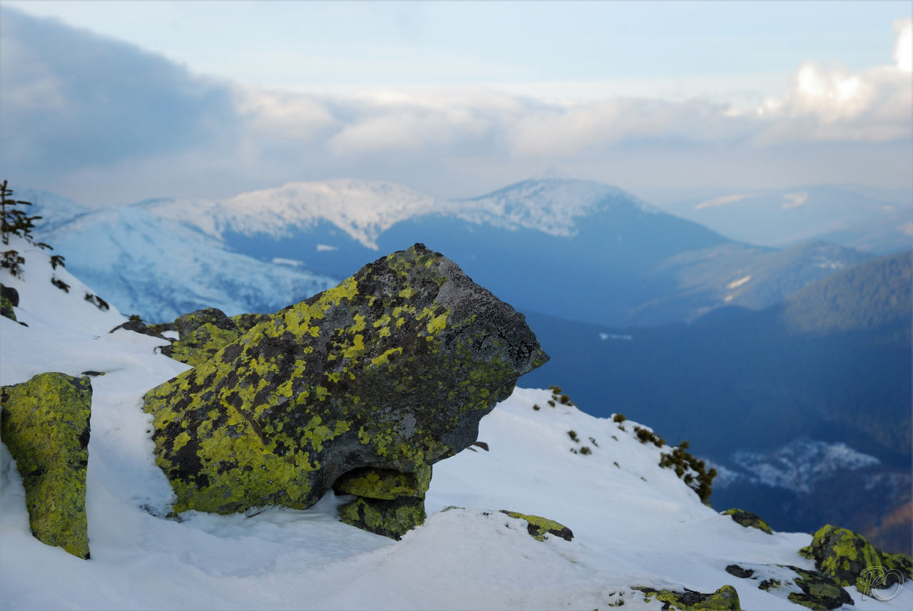 «Грофа», Рожнятівський район, Довгополянське лісництво, кв.21,36,38; Менгільське лісництво, кв.8,13,22,23,26; Осмолодське лісництво, кв.30,31,36; Різарнянське лісництво, кв.12; Піскавське лісництв, кв.39